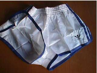 Schritt 1: fotografieren des Objekts auf neutralen Hintergrund (Dez. 2000 von mir fotografiert) - GNU - FDL